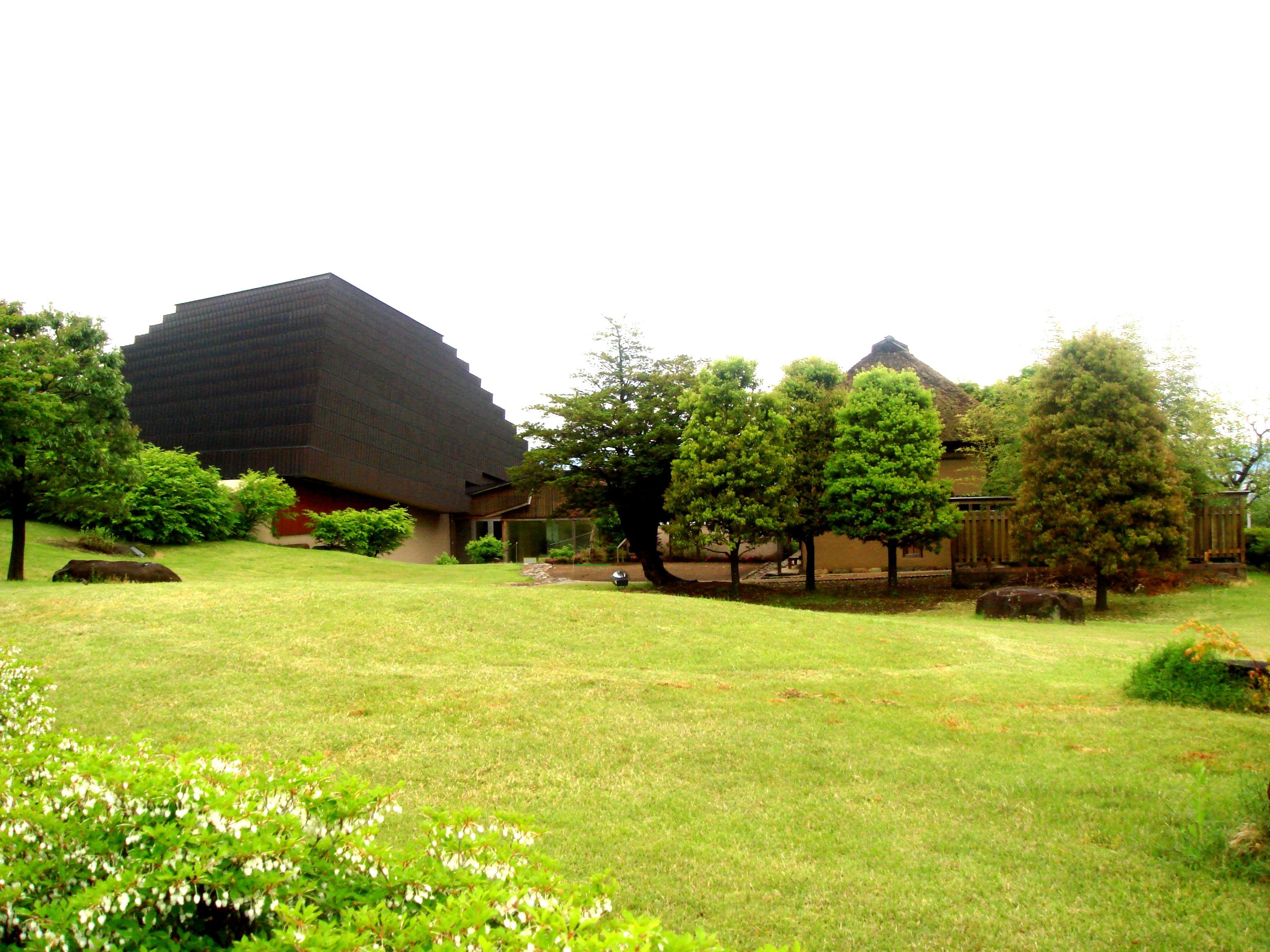 歴史公園信州高山一茶ゆかりの里一茶館(句碑広場からの全景）